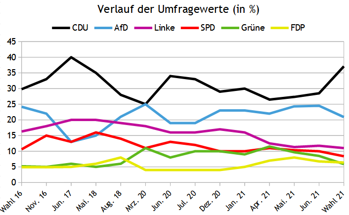 Umfragen zur Landtagswahl Sachsen-Anhalt 2021